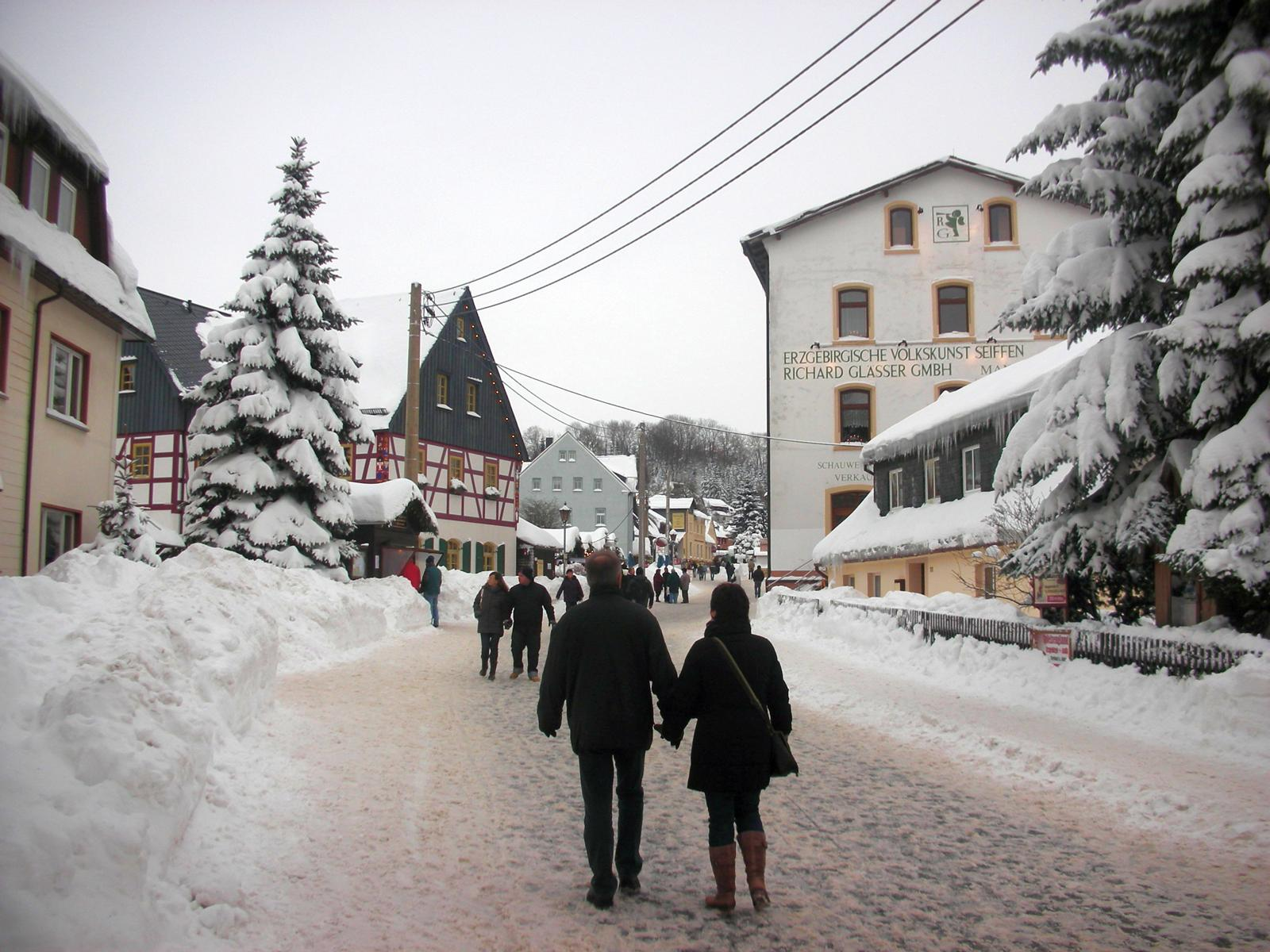 Hauptstrasse in Seiffen (Erzgebirge) am 4. Advent 2010